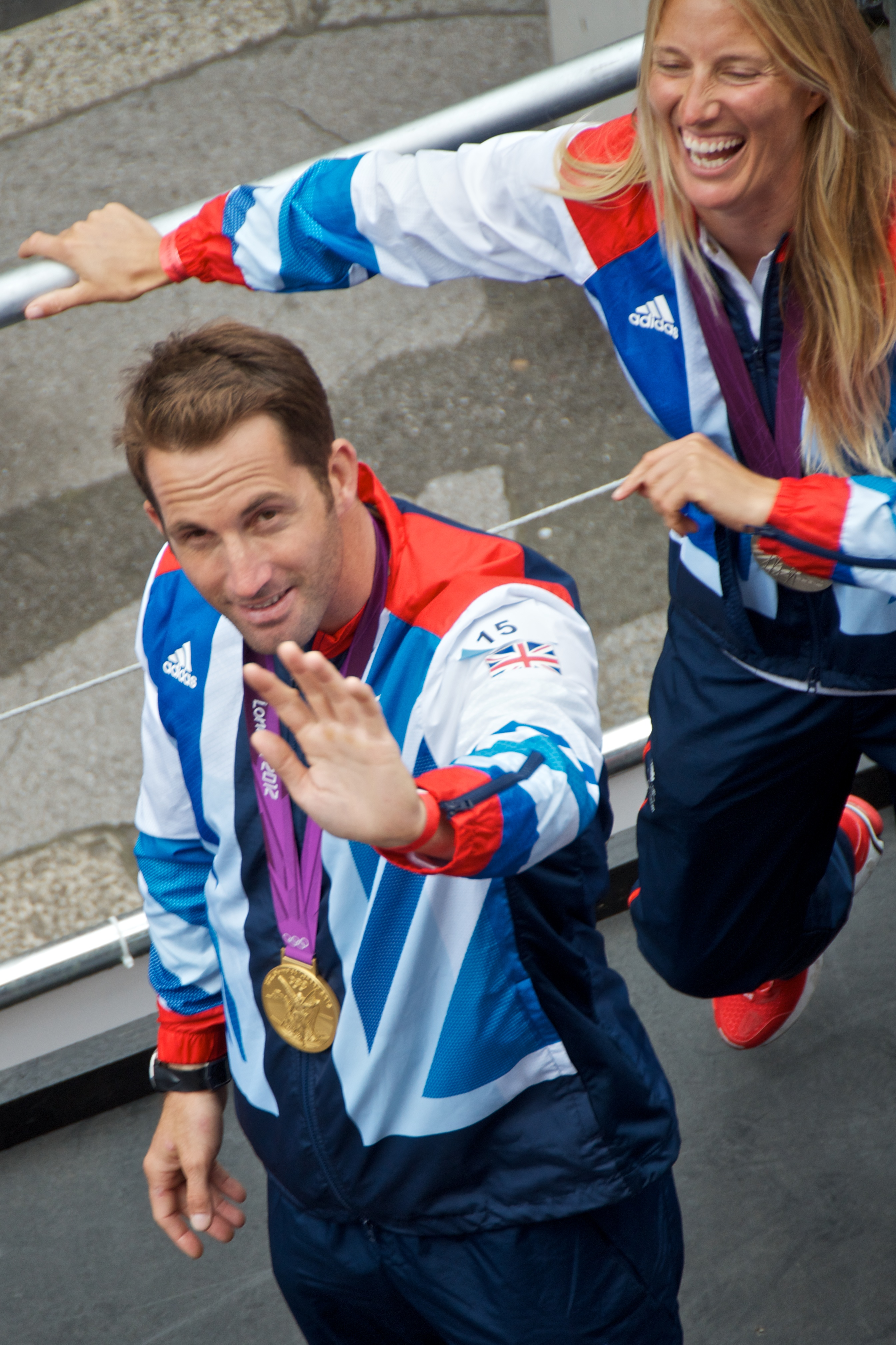 Sailing, Finn & 470 Class Ben Ainslie & Saskia Clark